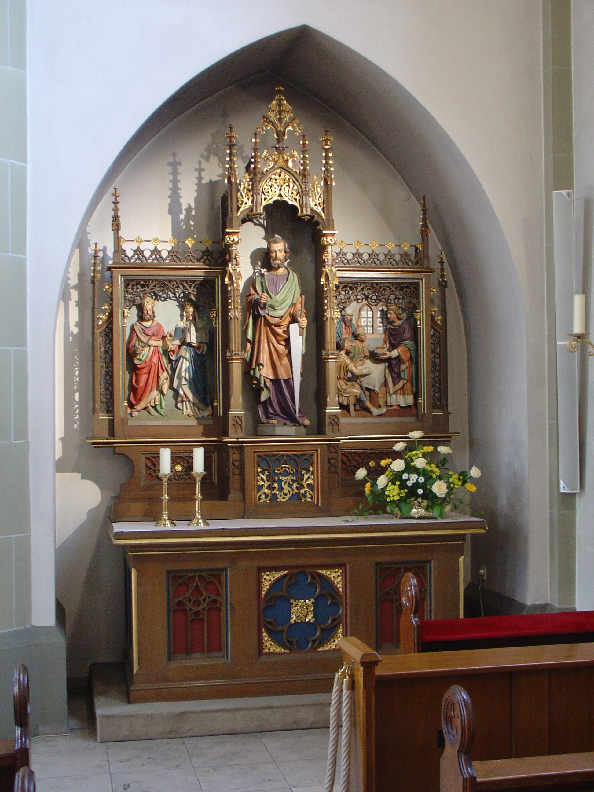 rechter Seitenaltar von St. Joseph in Delbrück-Westenholz